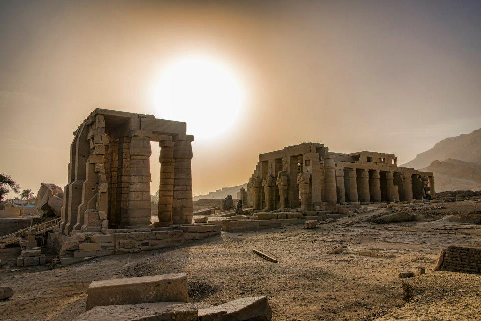 Egypt